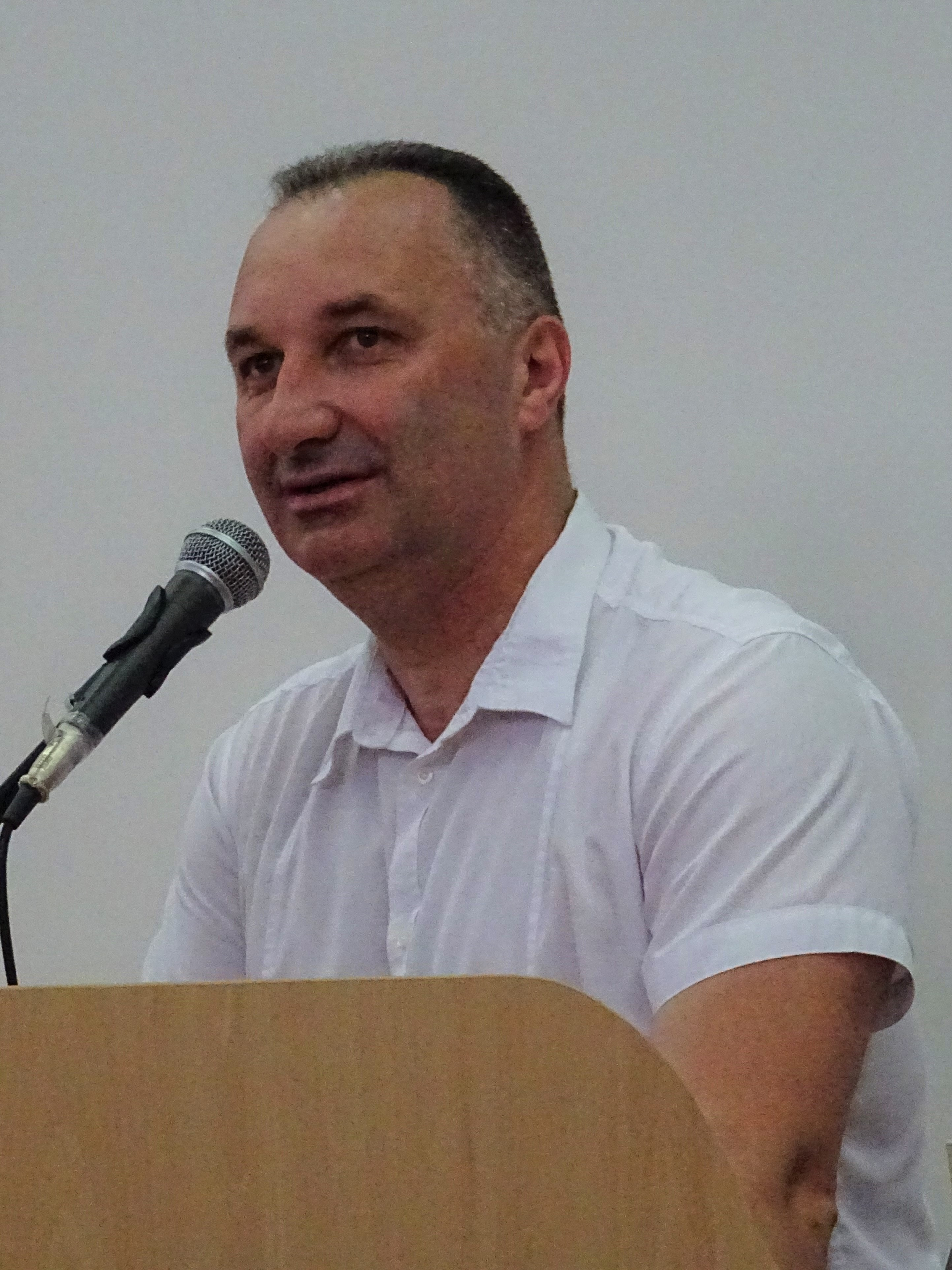 Далибор Стевић држи говор на затварању Учитељијаде 14. маја 2018. године на Педагошком факултету у Бијељини